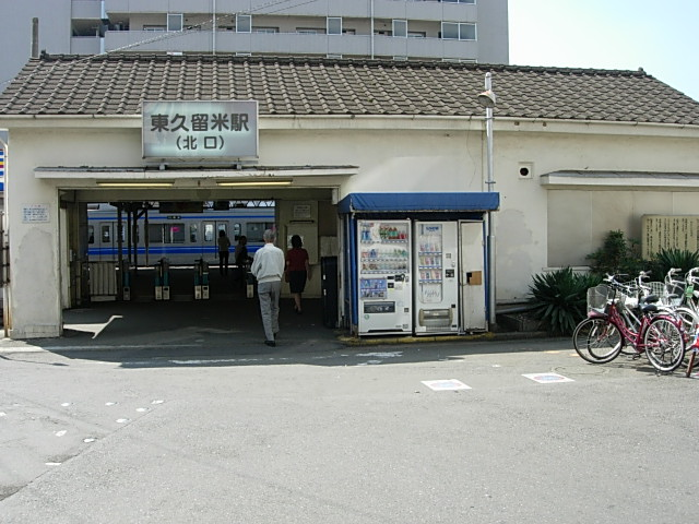 히가시쿠루메역 북쪽 출구